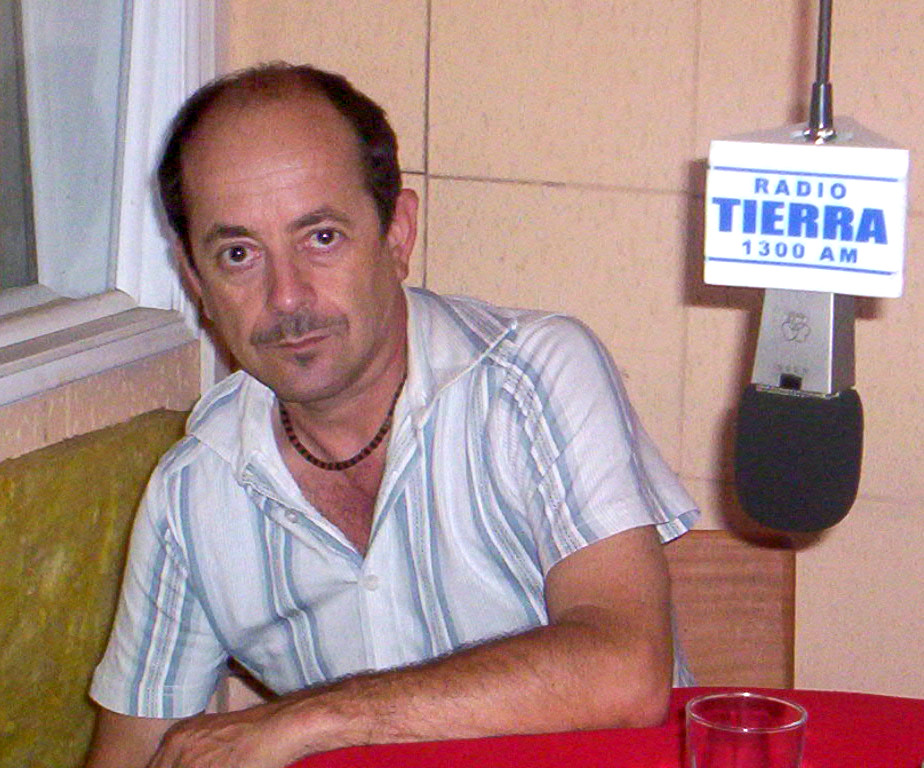 Ramon Grifero en radio tierra